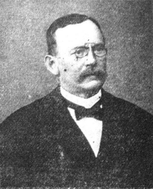 Österreichischer Politiker, Reichsratswahl 1907, Name siehe Dateiname